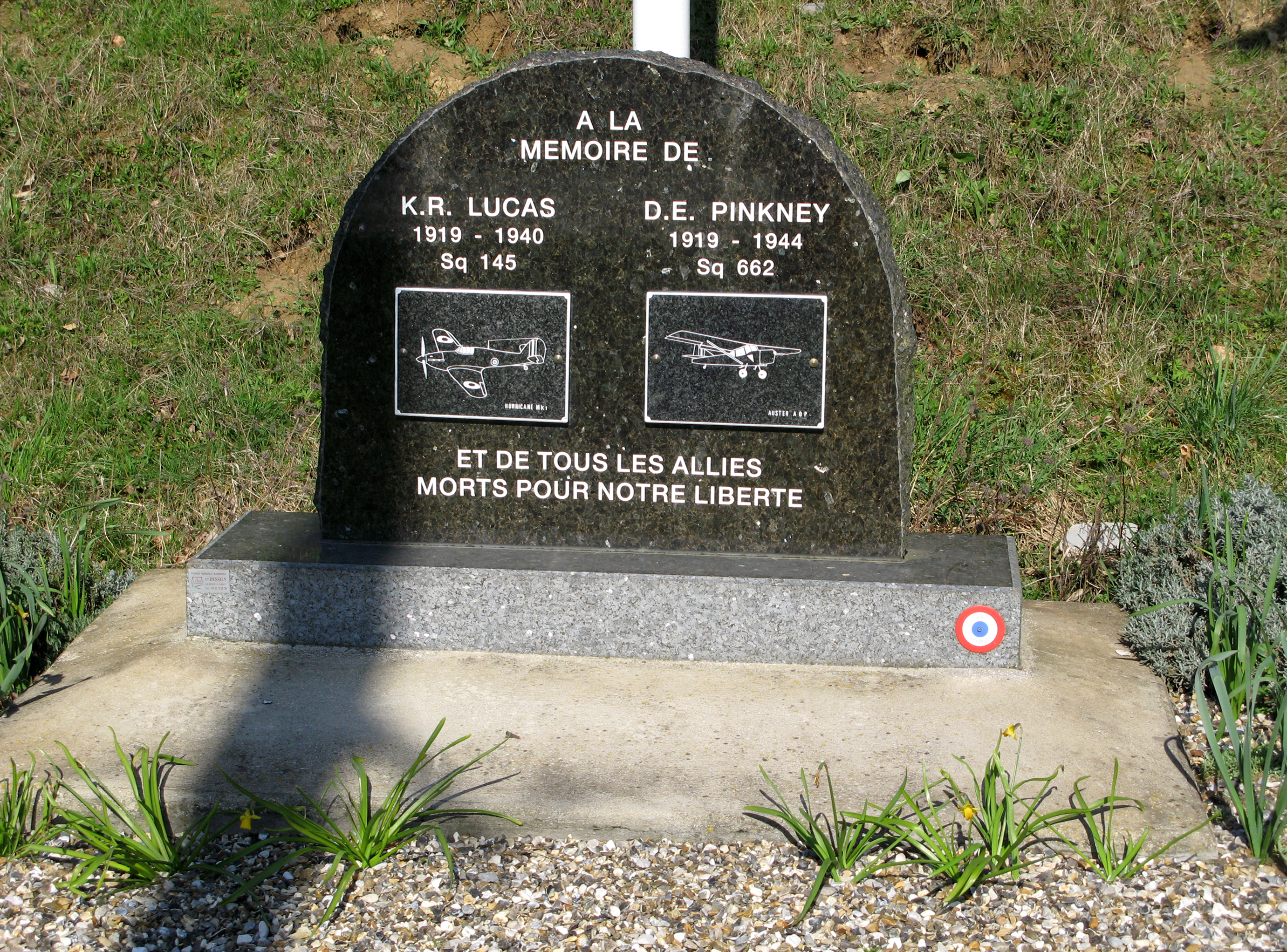 Warloy-Baillon (Somme, France) - La stèle à la mémoire des 2 aviateurs, à gauche à la sortie du village, juste avant le cimetière. .